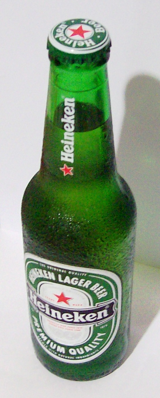 Heineken lager beer (made in China) 喜力啤酒